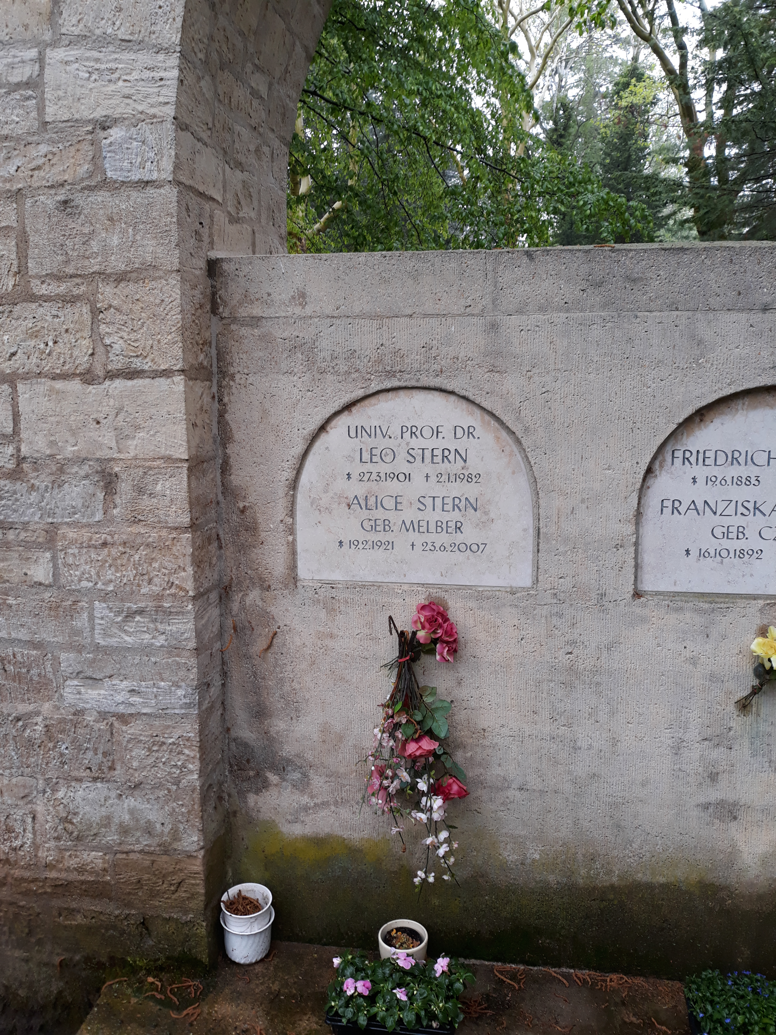 Urnengrabstätte des Historikers und Universitätsrektors Leo Stern und seiner Ehefrau Alice, Halle (Saale), Gertarudenfriedhof.